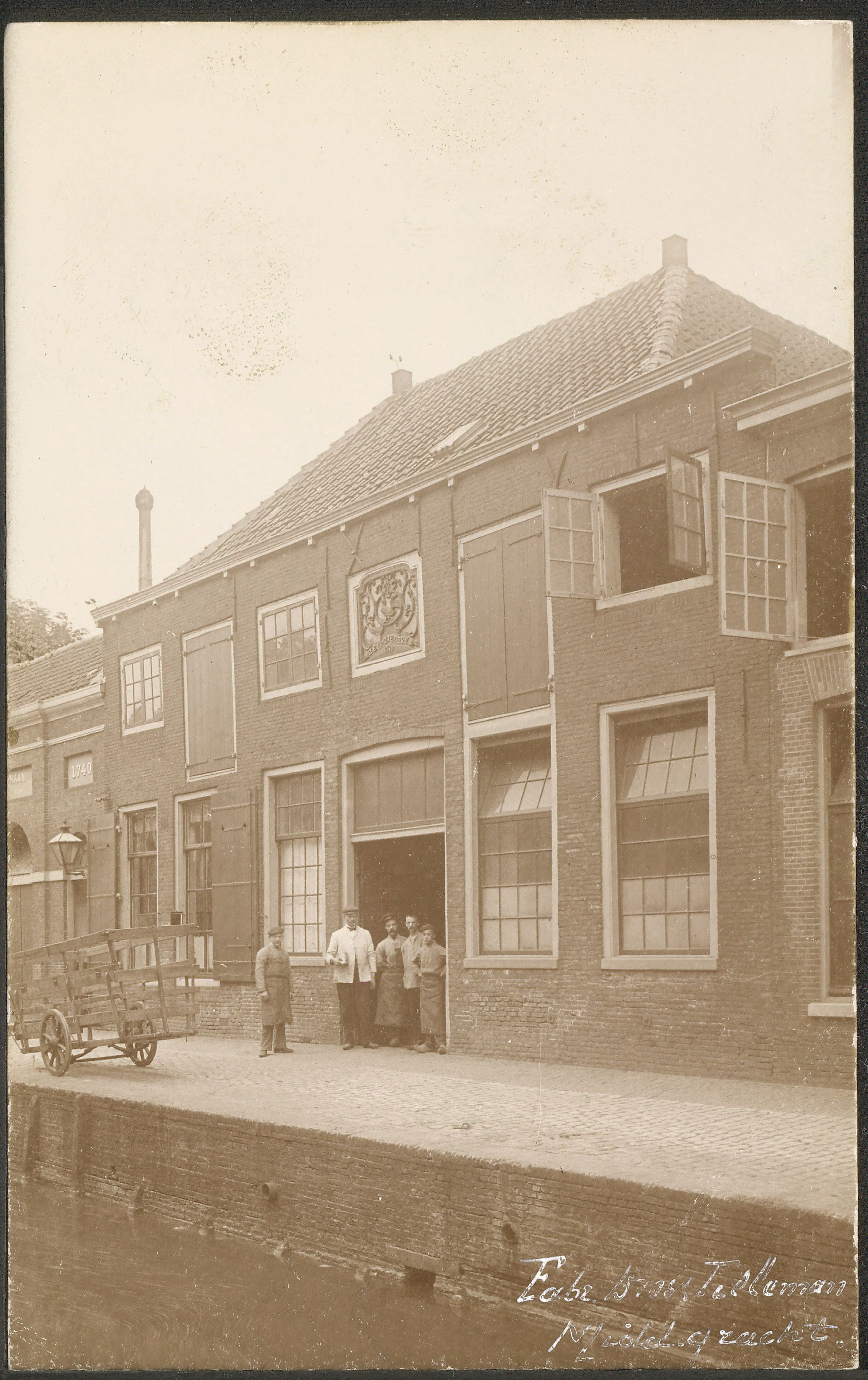 Gezicht op Dros & Tieleman. aan de Middelstegracht